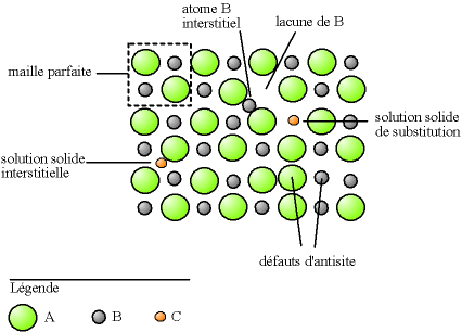 Défauts ponctuels dans un cristal ordonné AB. Auteur : Christophe Dang Ngoc Chan (Cdang), réalisé avec un programme de dessin vectoriel. Licence GFDL Christophe Dang Ngoc Chan (Cdang)